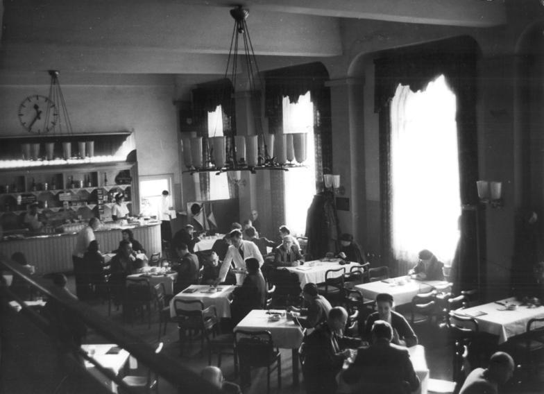 Zentralbild-Weiß 27.12.1956 Berlin Ostbahnhof-Dezember 1956 Tag und Nacht ist Mitropa-Gaststätte des Berliner Ostbahnhofs für die Reisenden geöffnet.